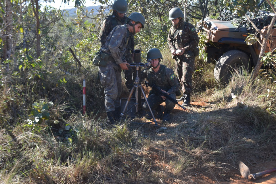 mORTEIRO 81MM ESA